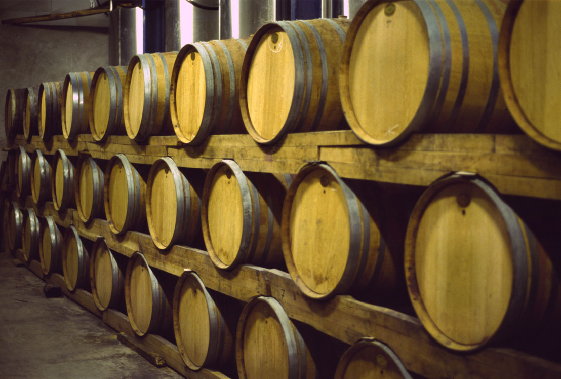 Barriquefässer in einem französischen Weinkeller